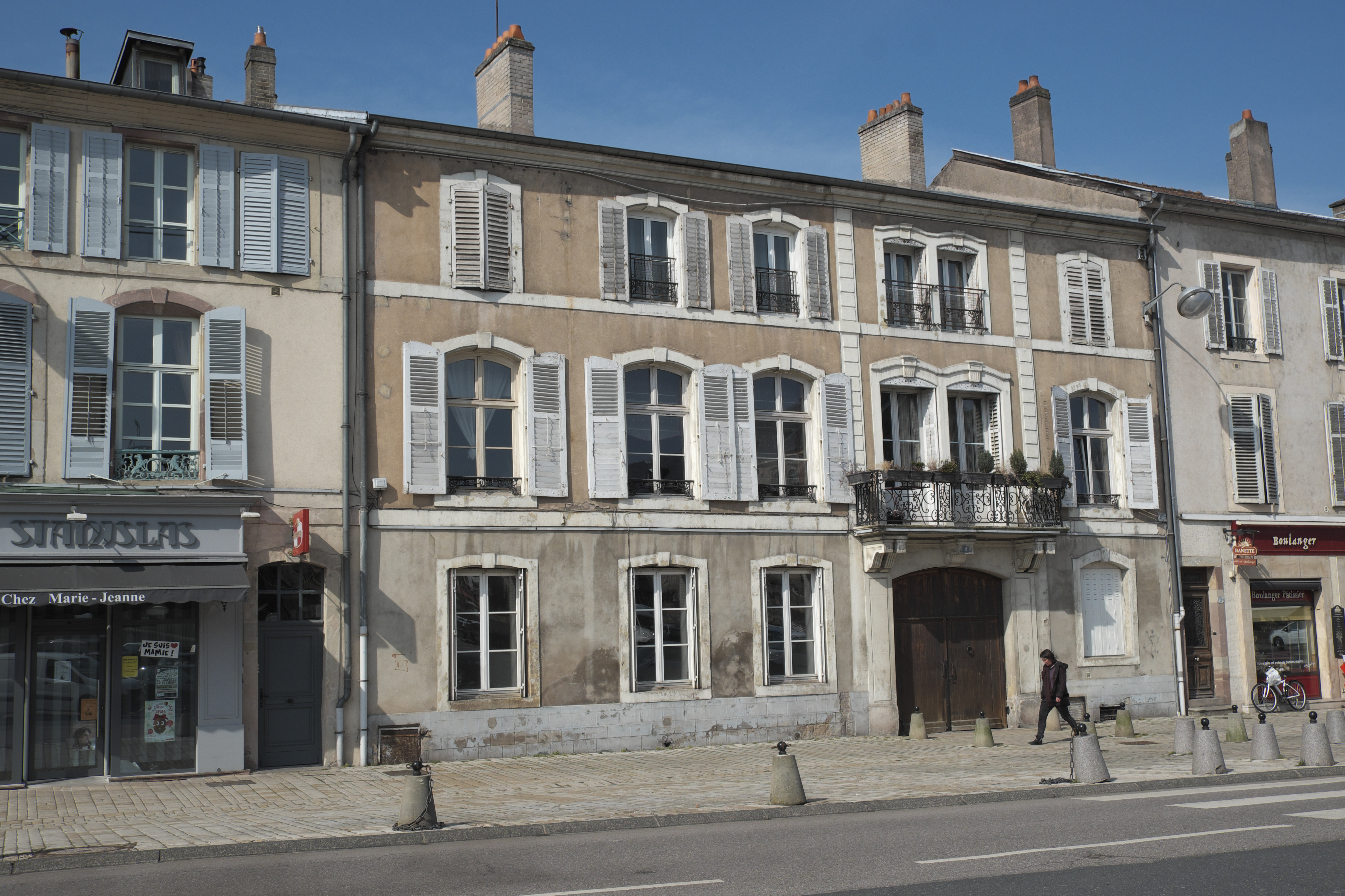 Gebäude, Place de la Deuxième Division, in Lunéville im Département Meurthe-et-Moselle in der Region Grand Est (Frankreich)